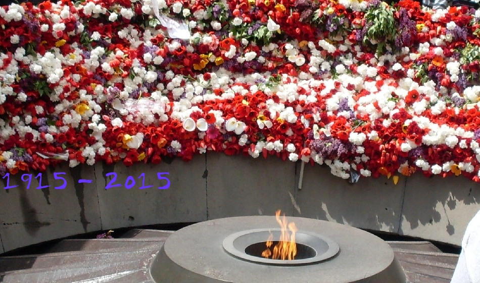 Հայոց ցեղասպանության 100-րդ տարելիցին նվիրված պատկեր